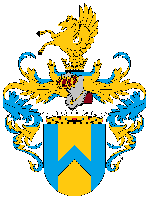 Wappen des österreichisch-ungarischen Feldmarschalls Eduard von Böhm-Ermolli (1856–1941), verliehen anlässlich seiner Erhebung in den österreichischen Freiherrenstand als Ritter des Militär-Maria-Theresien-Ordens 1917. Zeichnung von Gerd Hruška ( Für weitere Informationen zu dieser Standeserhebung siehe (